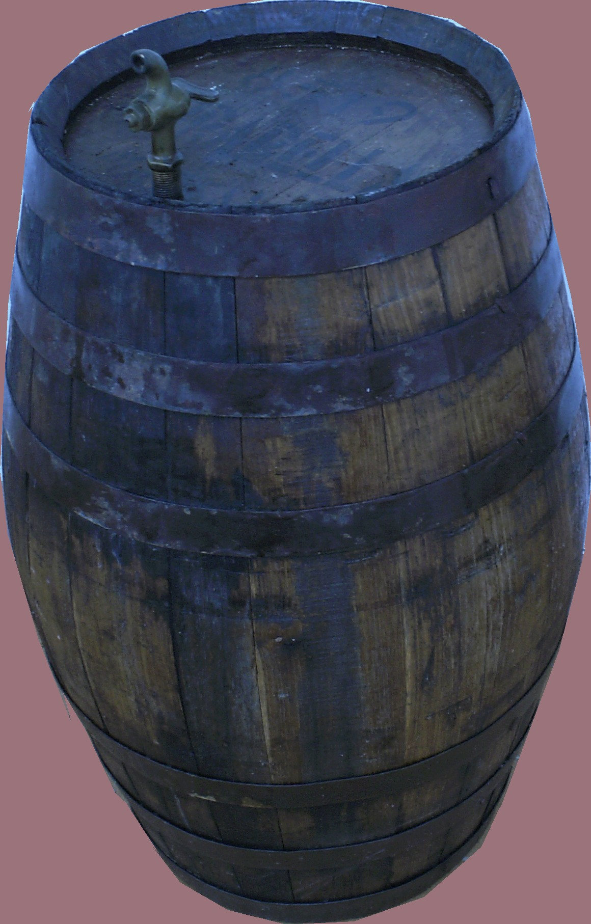 חבית עץ